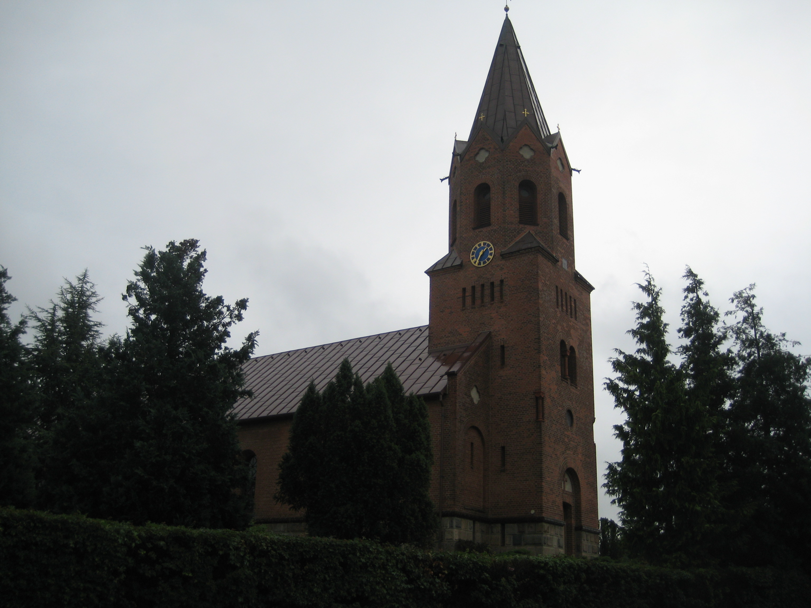 Holme Kirke, Århus i 2011